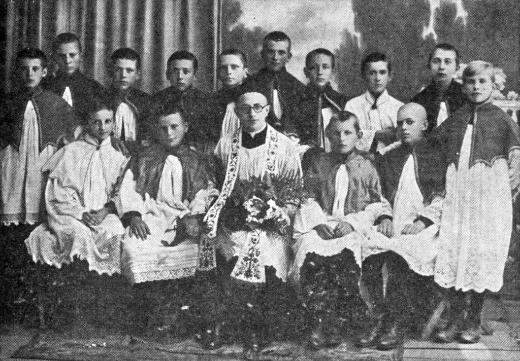 ks. Kazimierz Figlewicz z kółkiem ministrantów, po lewej stronie Karol Wojtyła, przyszły papież